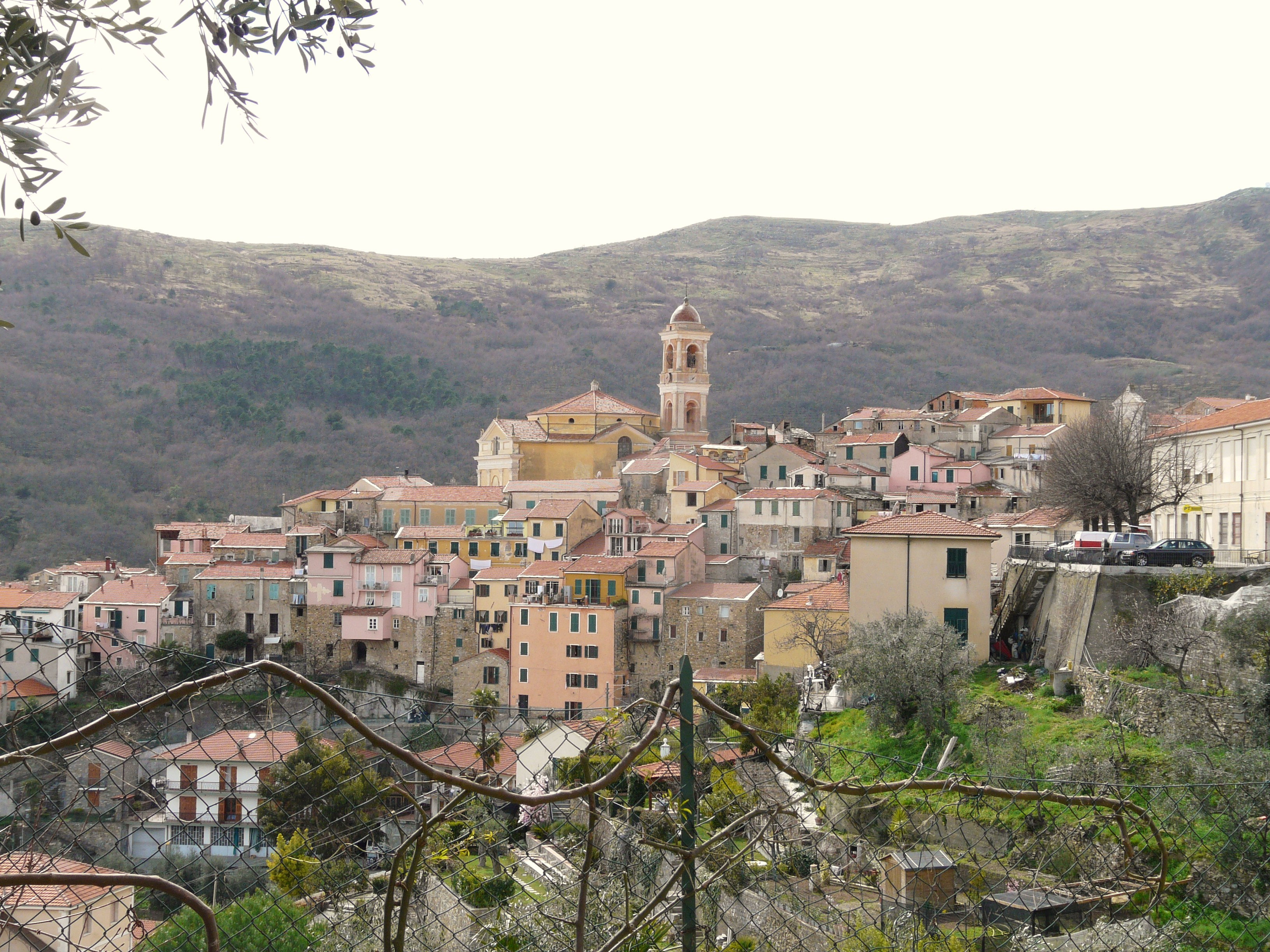 Pietrabruna, Liguria, Italia